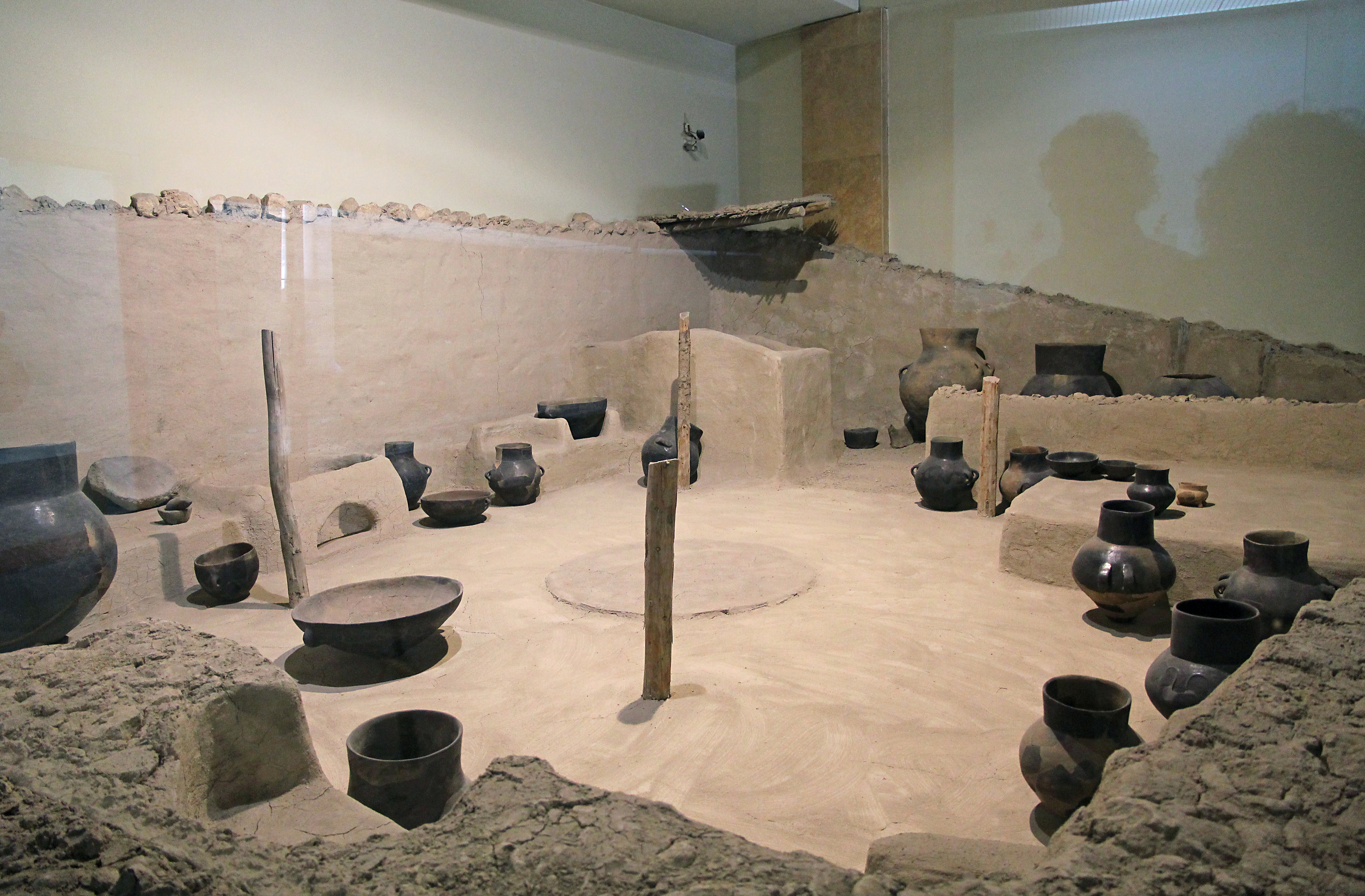 Archäologisches Museum Niğde, Türkei, Nachbau eines Hauses aus Köşk Höyük